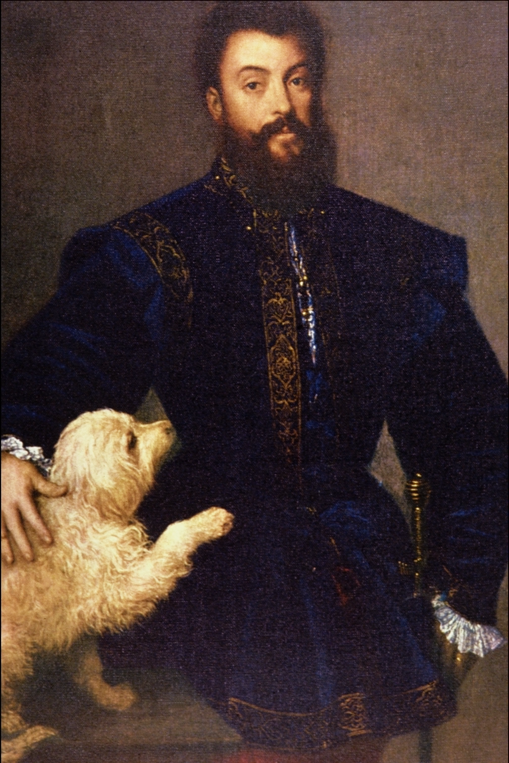 Retrato de Federico II Gonzaga (1500-1540), primer duque de Mantua e hijo del marqués Francisco II Gonzaga y de la marquesa Isabel de Este.